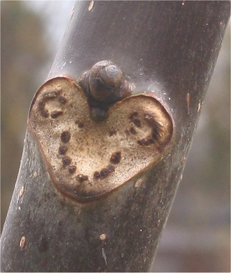 (Bladlitteken van Juglans regia op 1-jarige hoofdtak) Leaf scar on one year branch